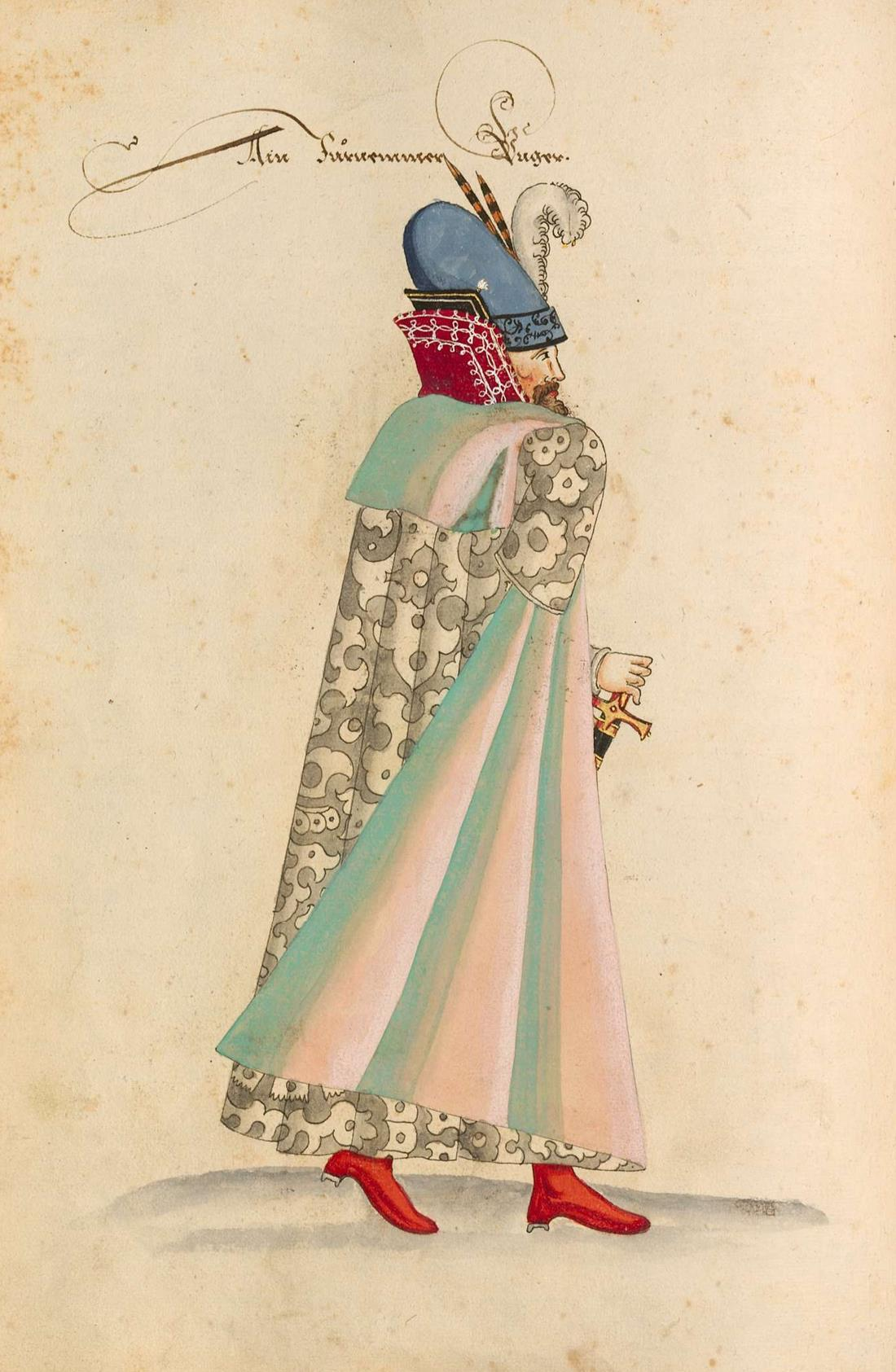 Magyar főúri öltözet 1500 körül - Kostüme der Männer und Frauen in Augsburg und Nürnberg, Deutschland, Europa, Orient und Afrika